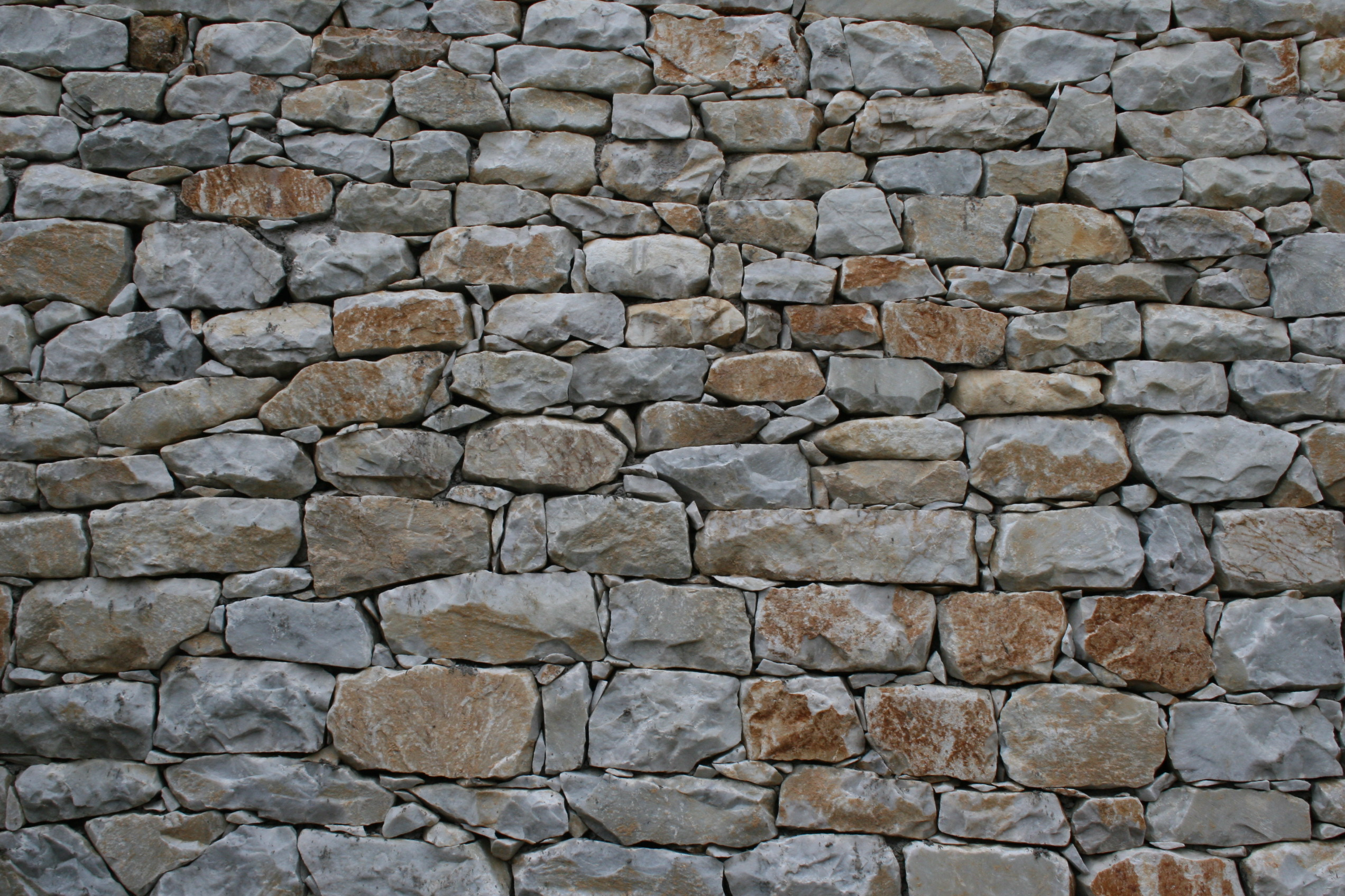 Bruchsteinmauerwerk